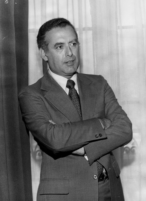 Hernán Cubillos Sallato, Ministro de Relaciones Exteriores de Chile entre 1978 y 1980.